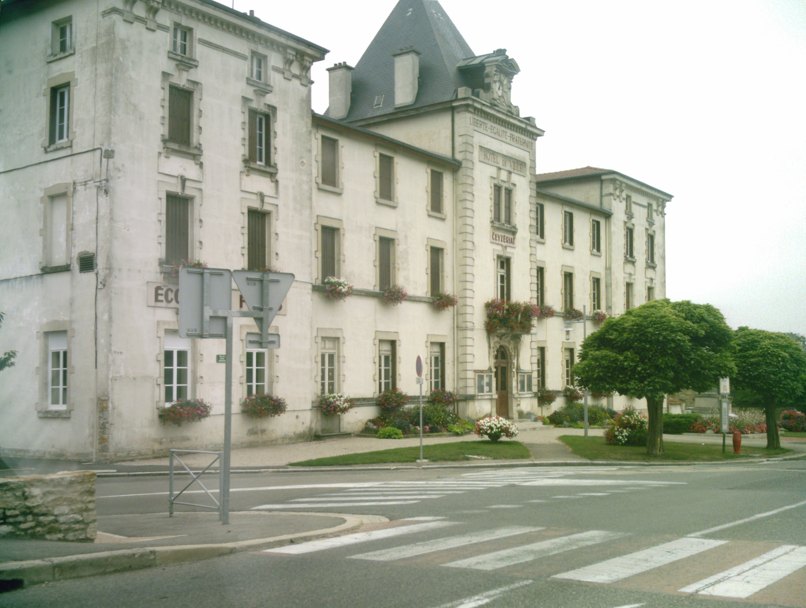 L'hôtel de ville de Ceyzériat, Ain, France